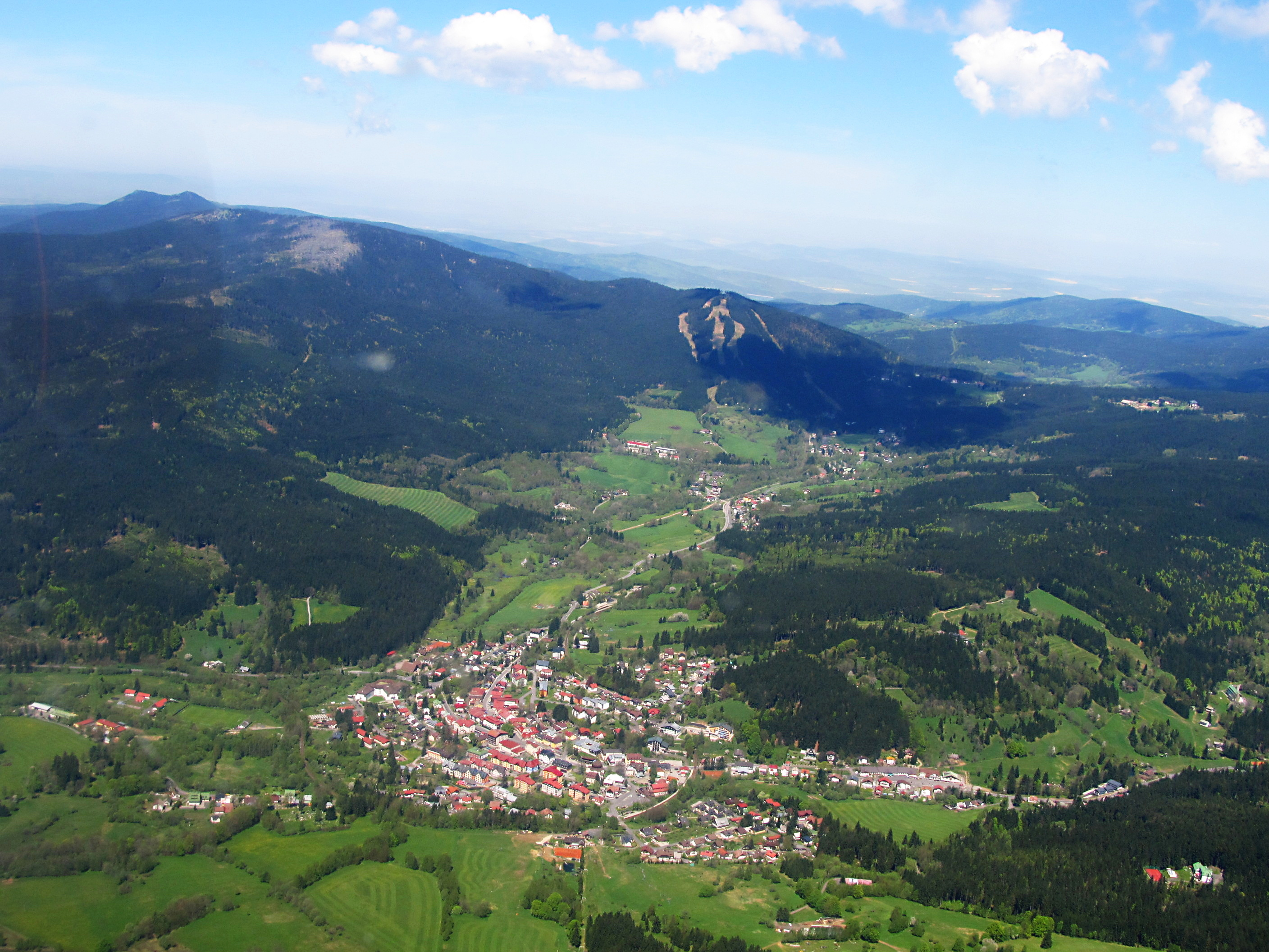 Železná Ruda, Ostrý, Svaroh, Jezerní hora a Špičák z ptačího pohledu